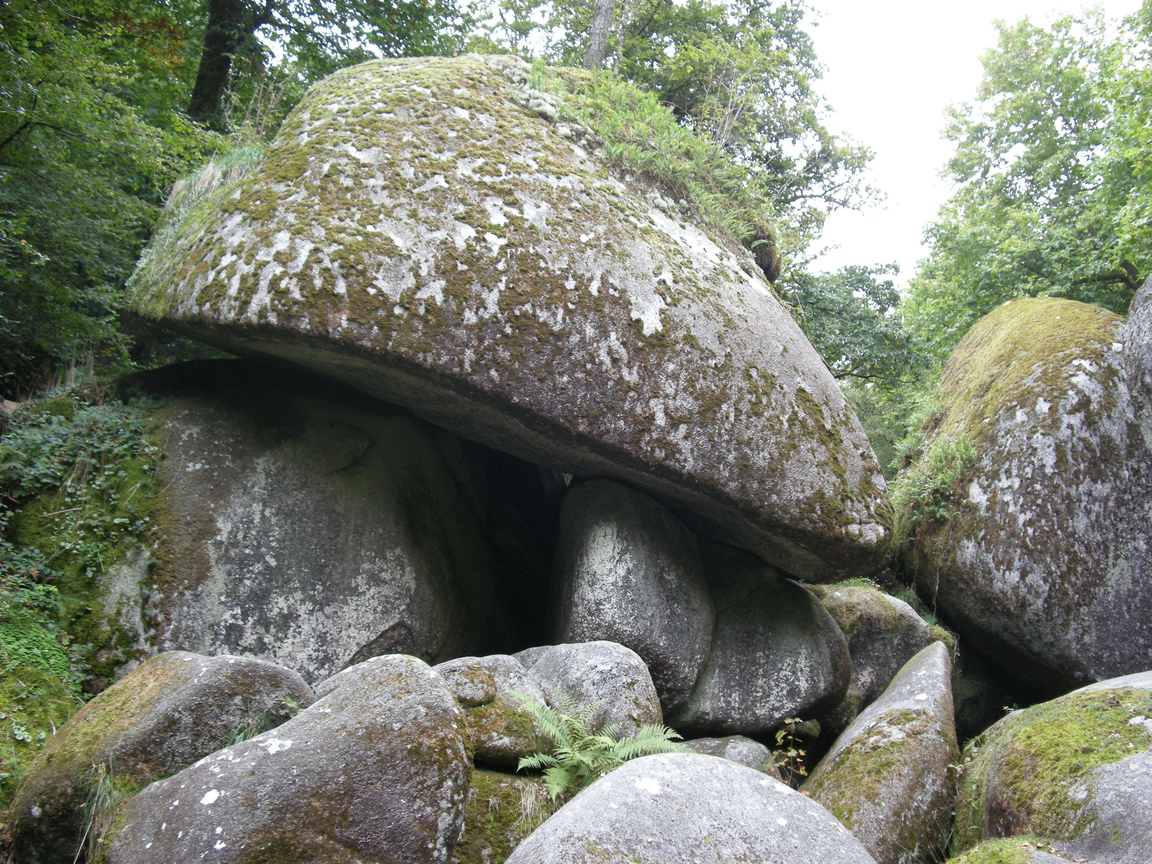 Détail du chaos du ménage de la vierge, forêt de Huelgoat, dans le Finistère (France)